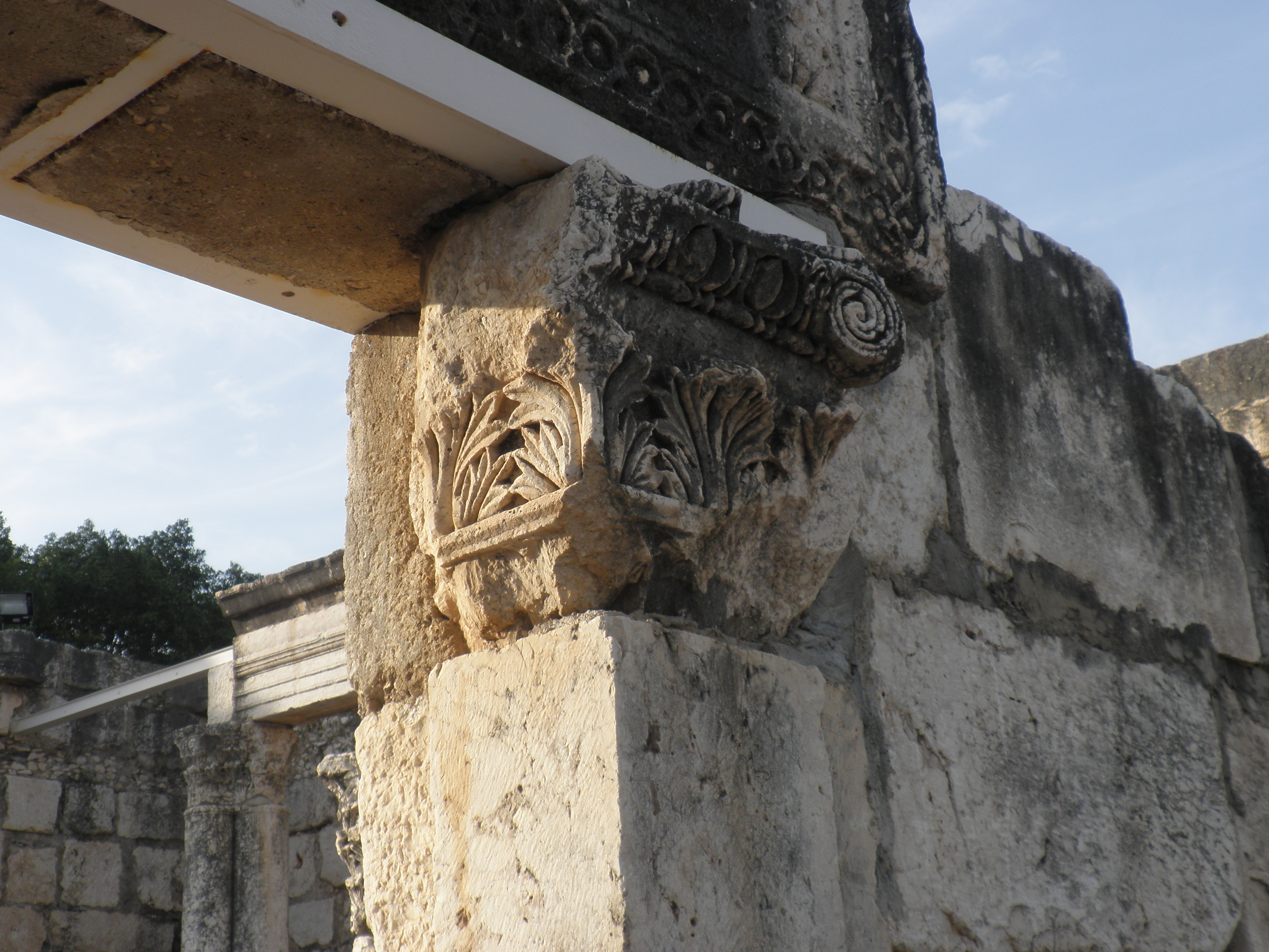 Kafarnaum. Eklekticky pojatá hlavice sloupu v synagóze.